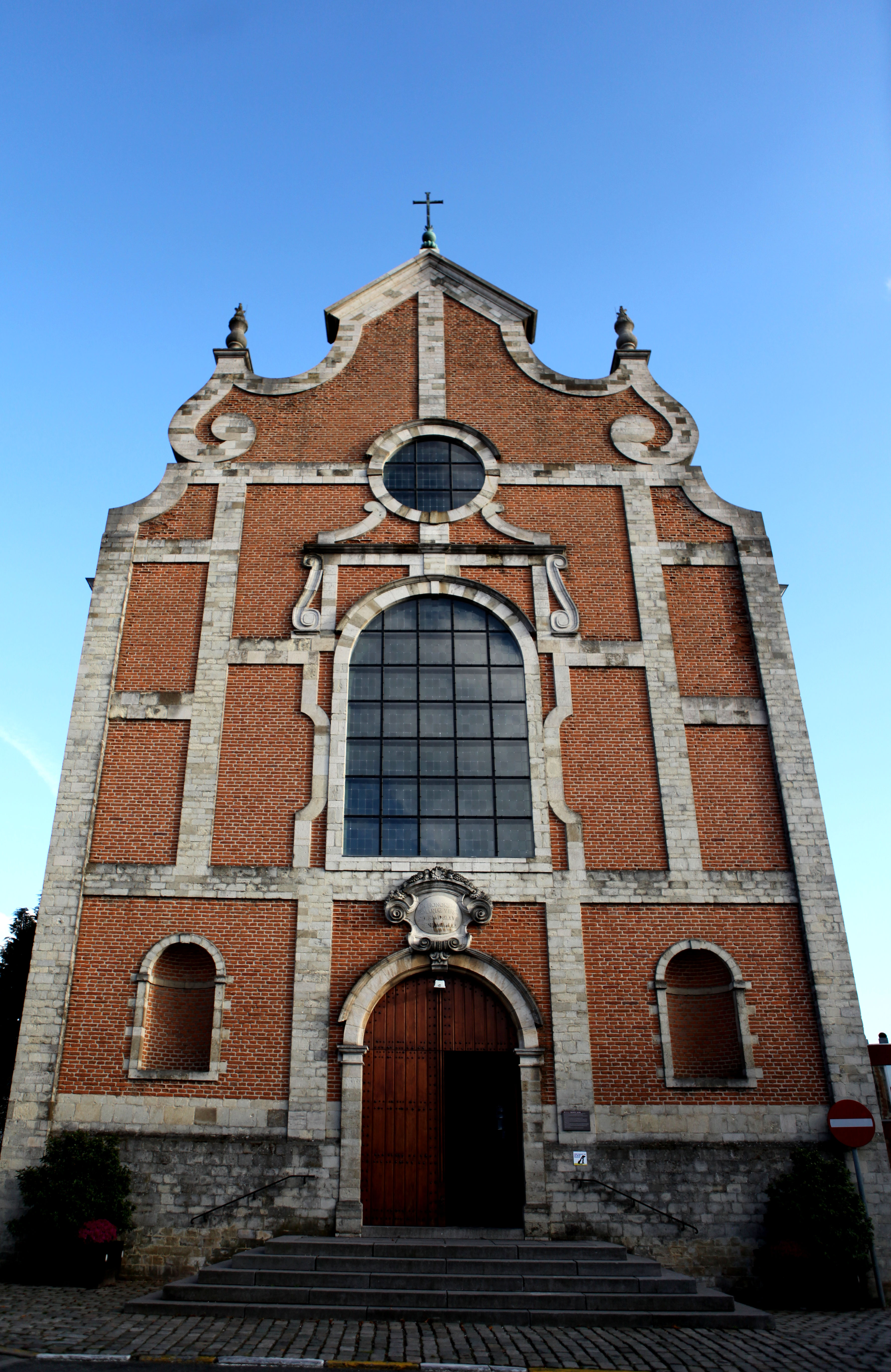 Façade occidentale de Notre-Dame-au-Bois de Jezus-Eik